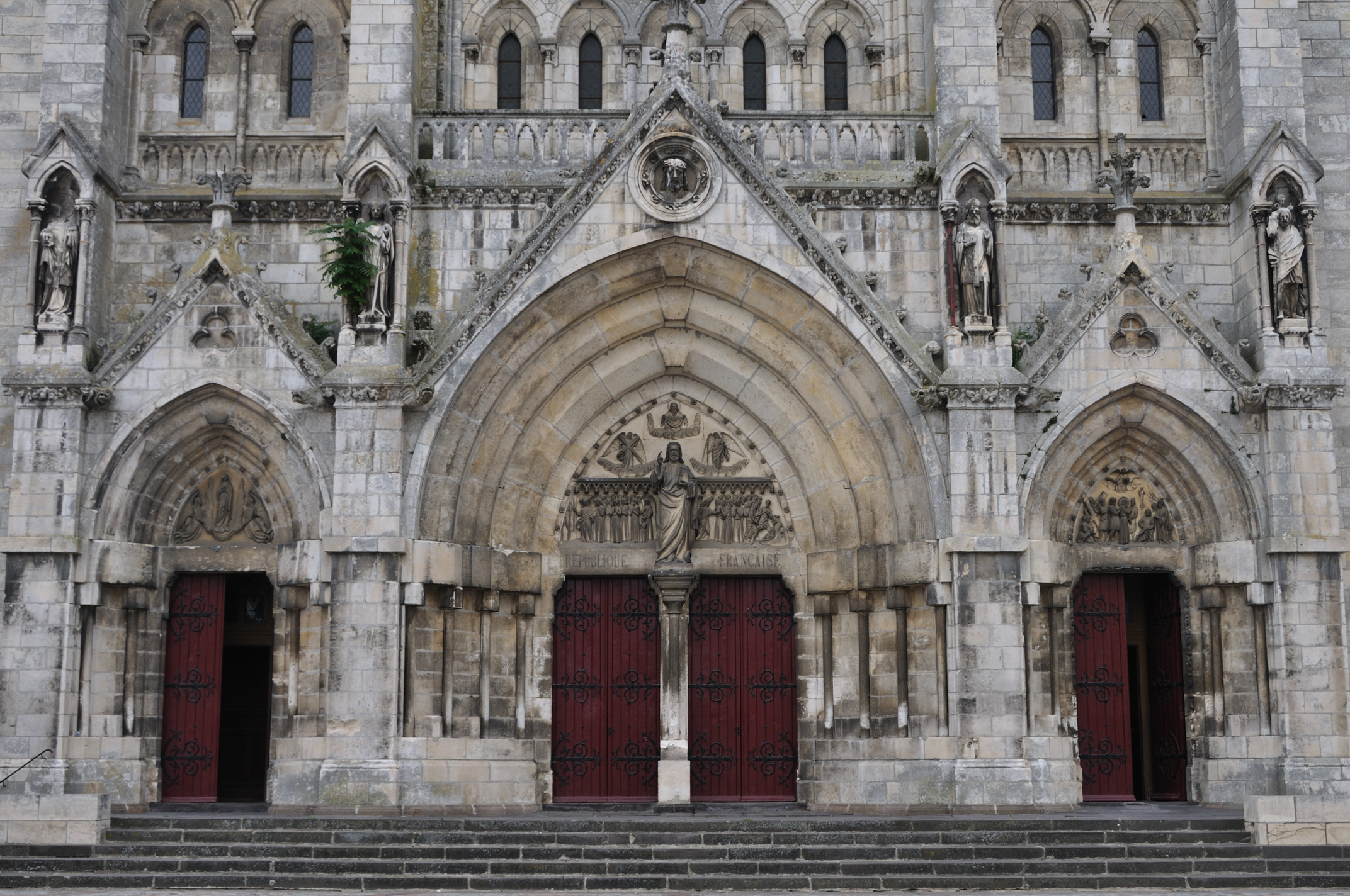 Portails de l'église Saint-André, Châteauroux, Indre, France